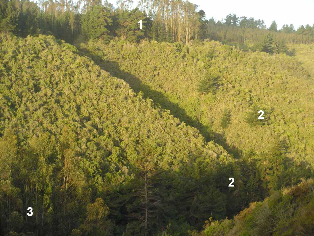 Se encuentran pinos como especies invasoras